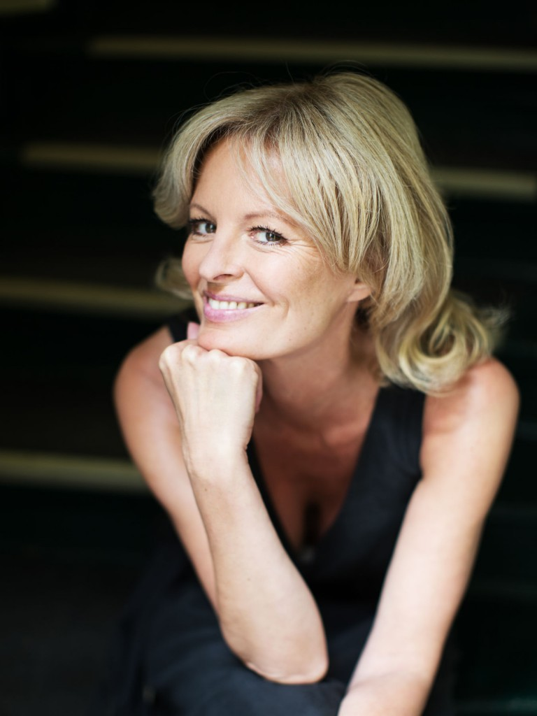 Claudia Neidig - Geschäftsführerin der Agentur Neidig